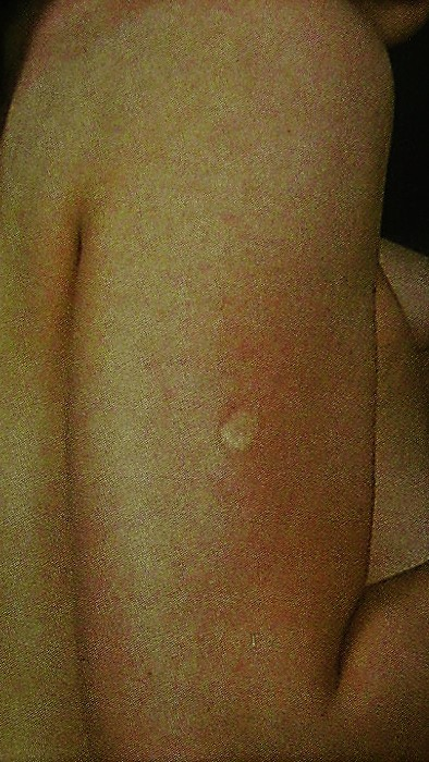 種痘接種後に終生残る瘢痕